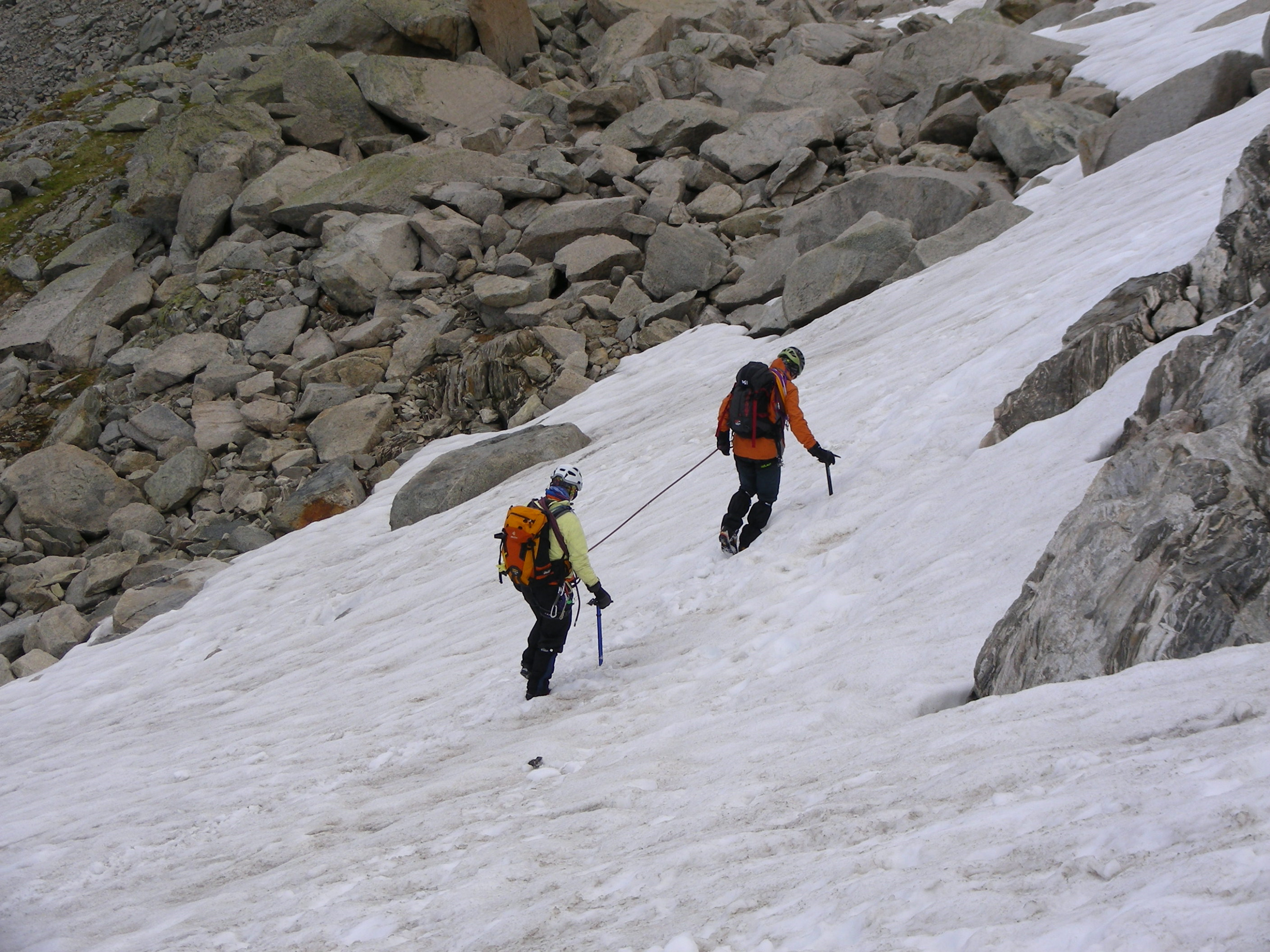 Ecole de neige : la progression corde tendue